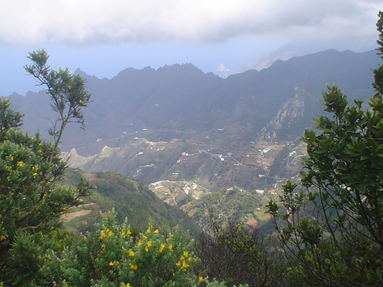 Pico El Ingles